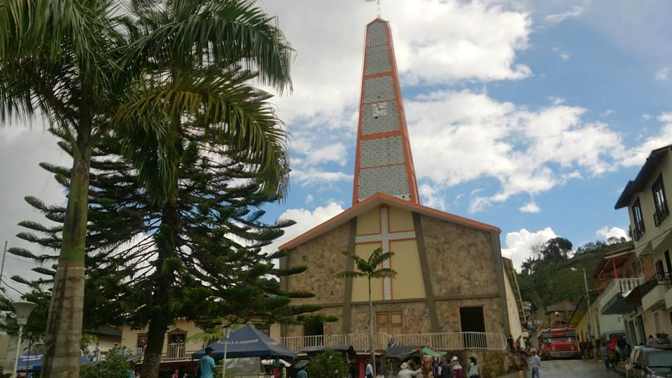 Esta fotografía fue tomada en el municipio colombiano con código 05819.